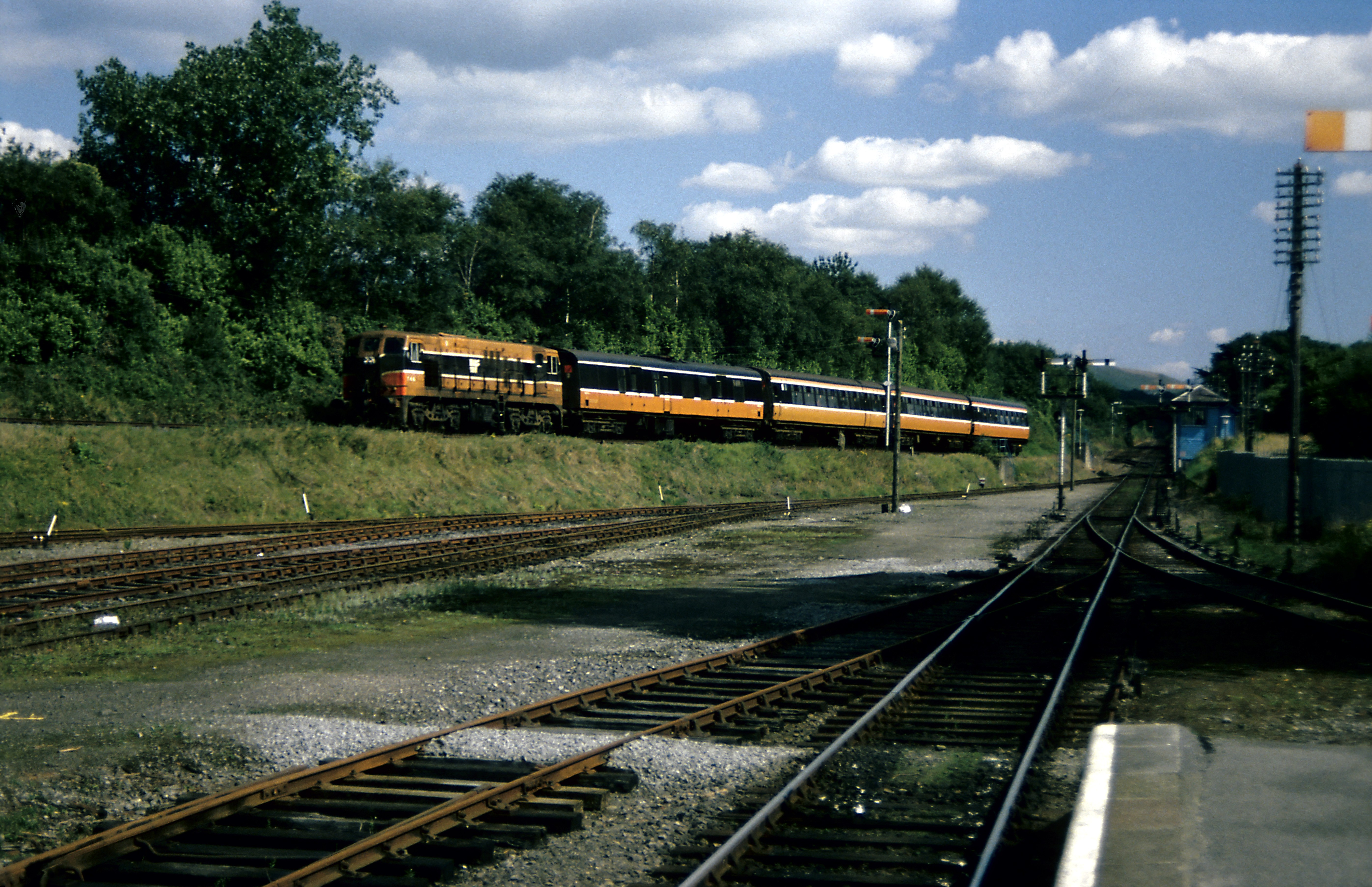 Wegen der Trassierung und der Lage der Stadt Killarney ist der Umbau des Bahnhofs in einen einfachen Durchgangsbahnhof nicht möglich. Nach dem Zurückdrücken des Zuges vom Bahnsteig ins Ausziehgleis fährt der Zug Richtung Tralee weiter. Die Gleisentwicklung ermöglicht Durchfahrten Tralee–Mallow und umgekehrt, doch nur ohne Vorbeifahrt an einem Bahnsteig.